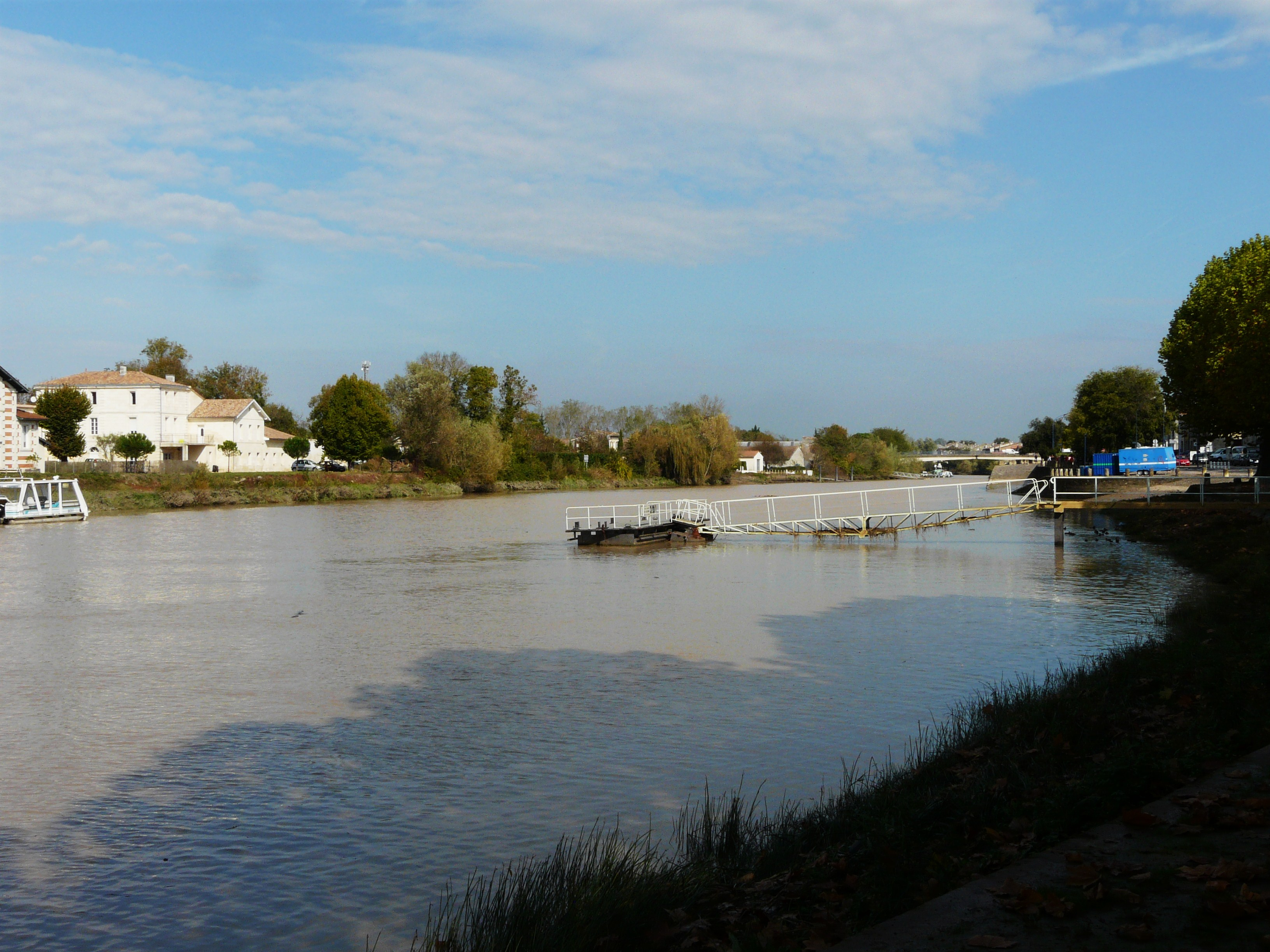 L'Isle dans sa partie terminale à Libourne, Gironde, France